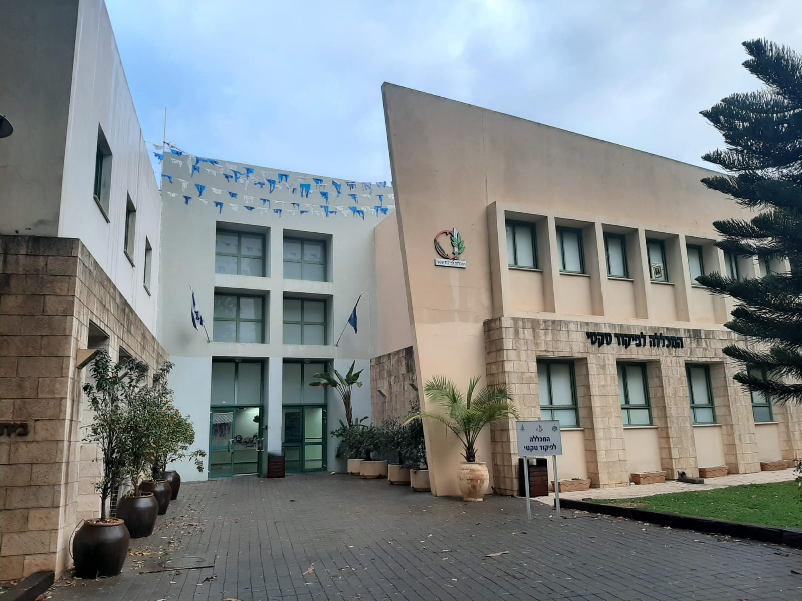 מבנה המלט"ק